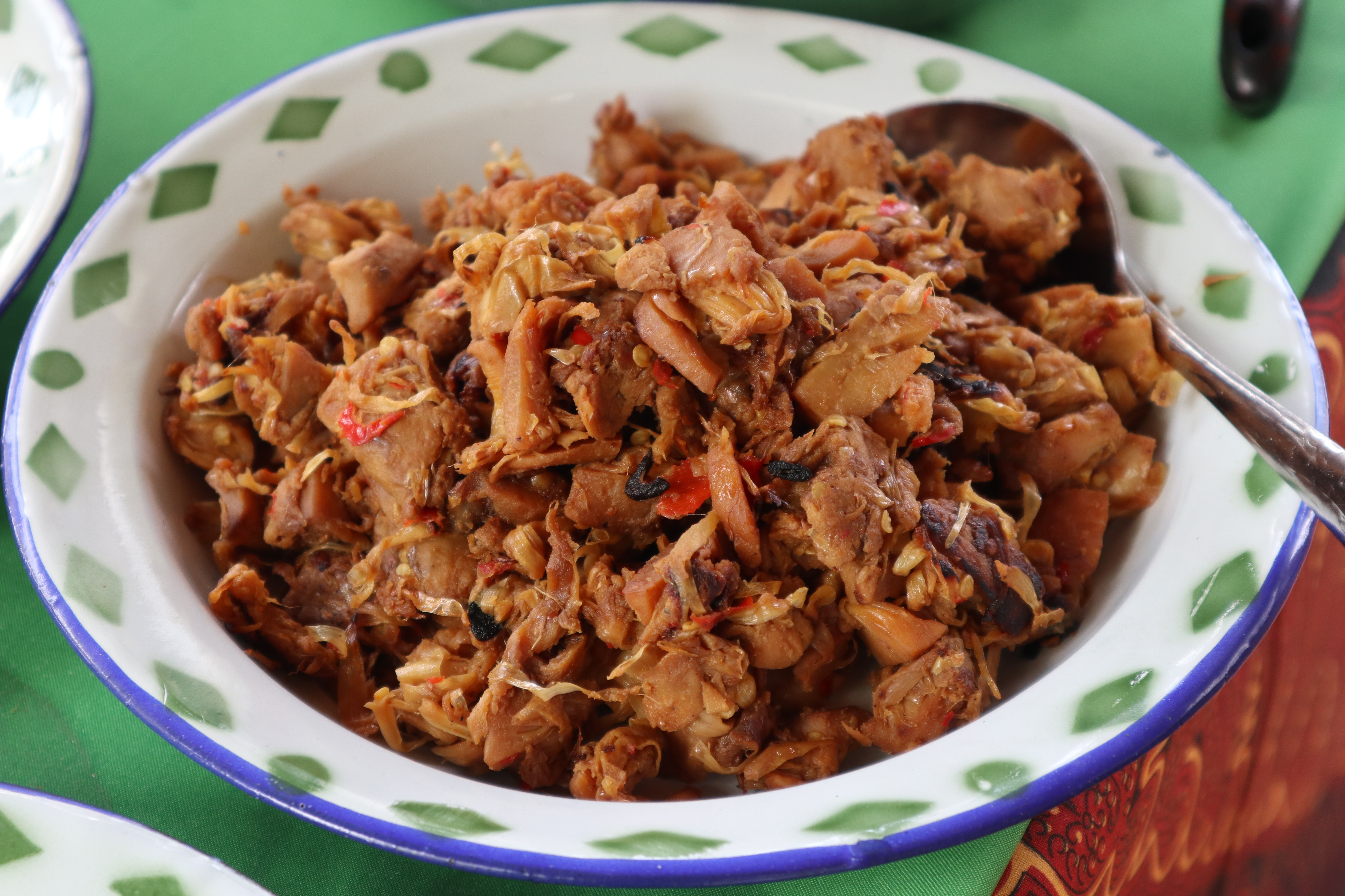 Oseng-oseng atau tumis mandai adalah masakan Banjar yang terbuat dari daging kulit dalam buah cempedak yang telah difermentasi untuk kemudian digoreng.